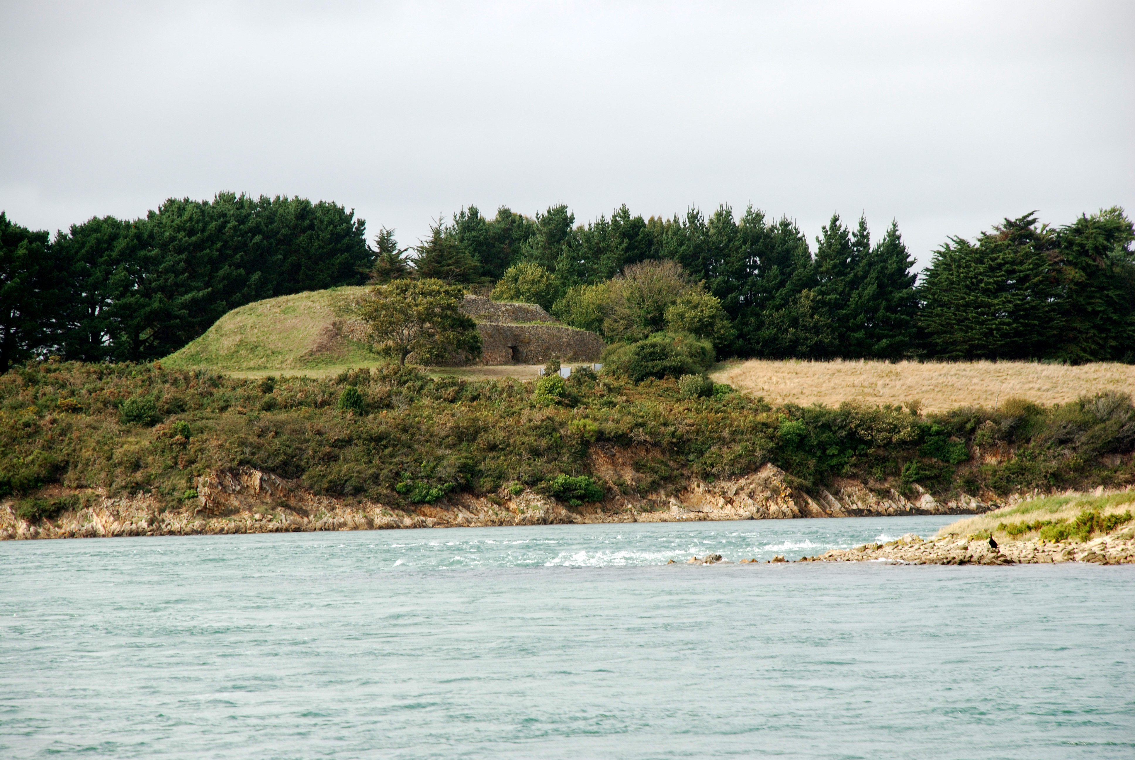 Gavriniz, gant he c'harn brudet, savet war-dro -3500.